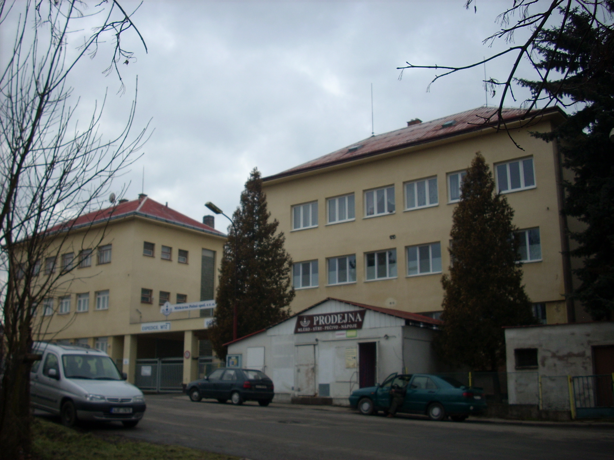 Mlékárna Polná